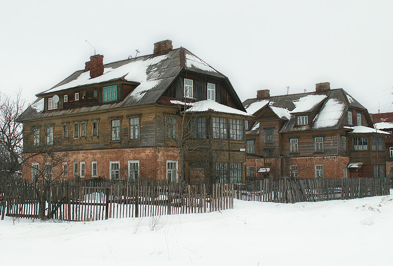 Кооперативный поселок в г. Вичуге (1925-1930)